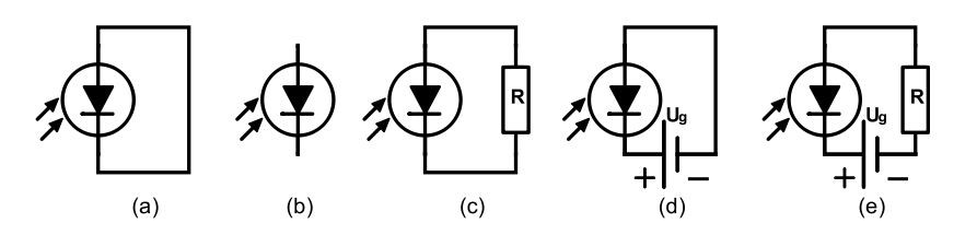 Enostavni primeri vezave fotodiode v vezje: a) kratko sklenjena fotodioda, b) fotodioda v fotovoltaičnem načinu, c) zaporedna vezava fotodiode in upora, d) vezava z napetostjo v zaporni smeri (ang. 'reverse bias'), e) vezava z napetostjo v zaporni smeri in uporom.